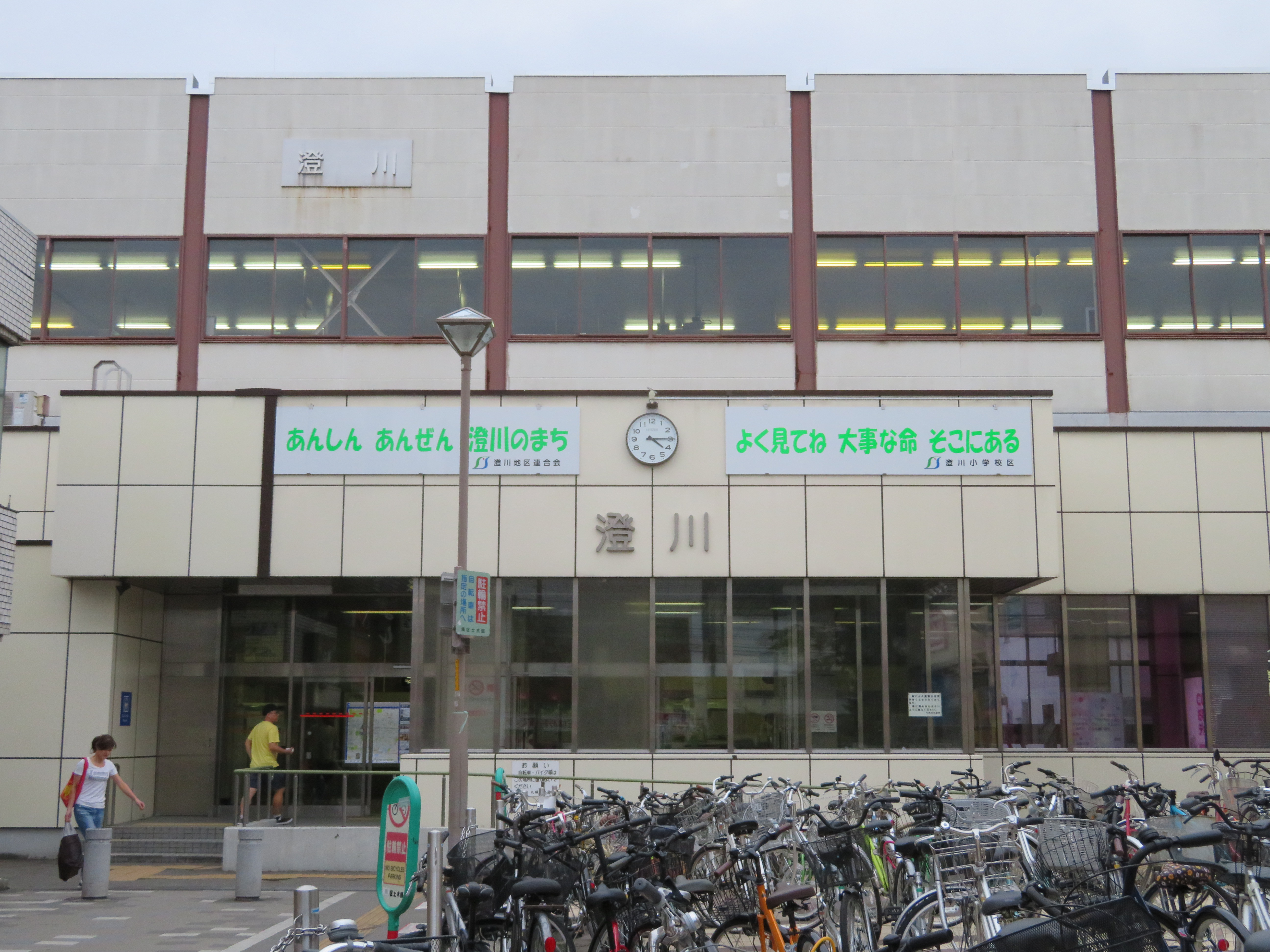 澄川駅出入口